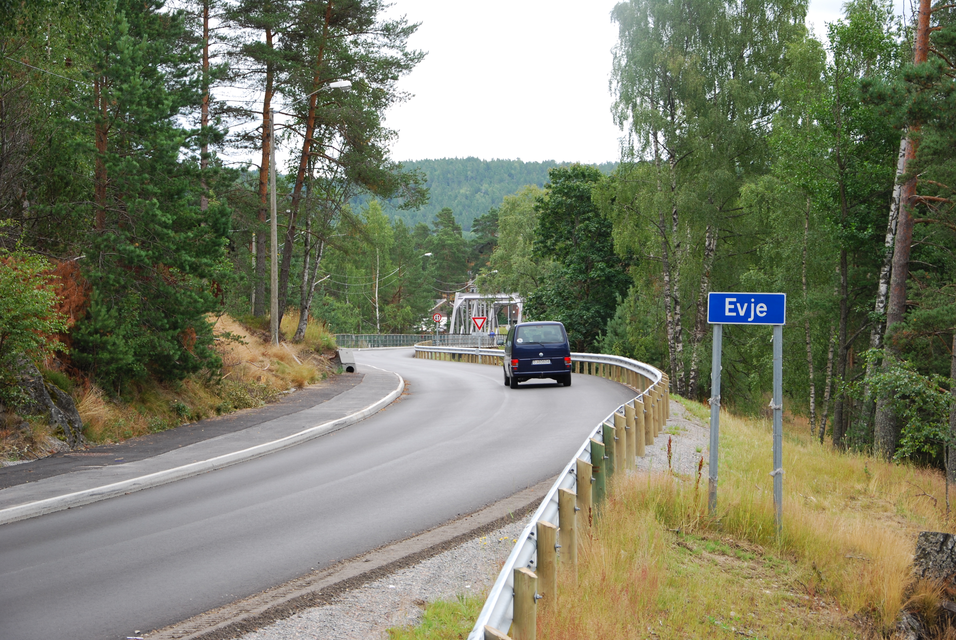 Yup, Evje